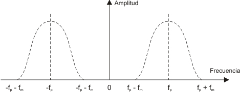 Polsos en fc i -fc.